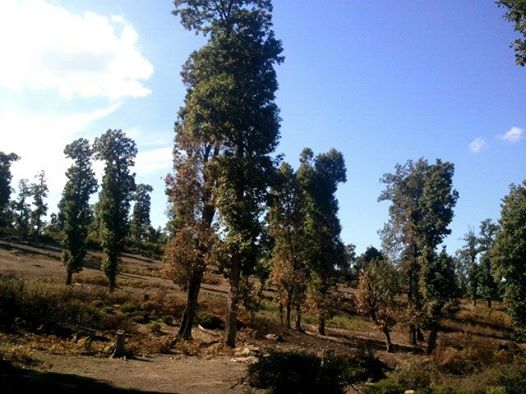 achjar zane